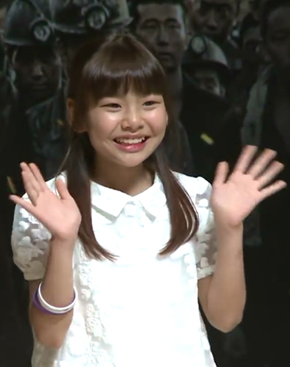 2017년 6월 15일, 영화 '군함도' 제작보고회